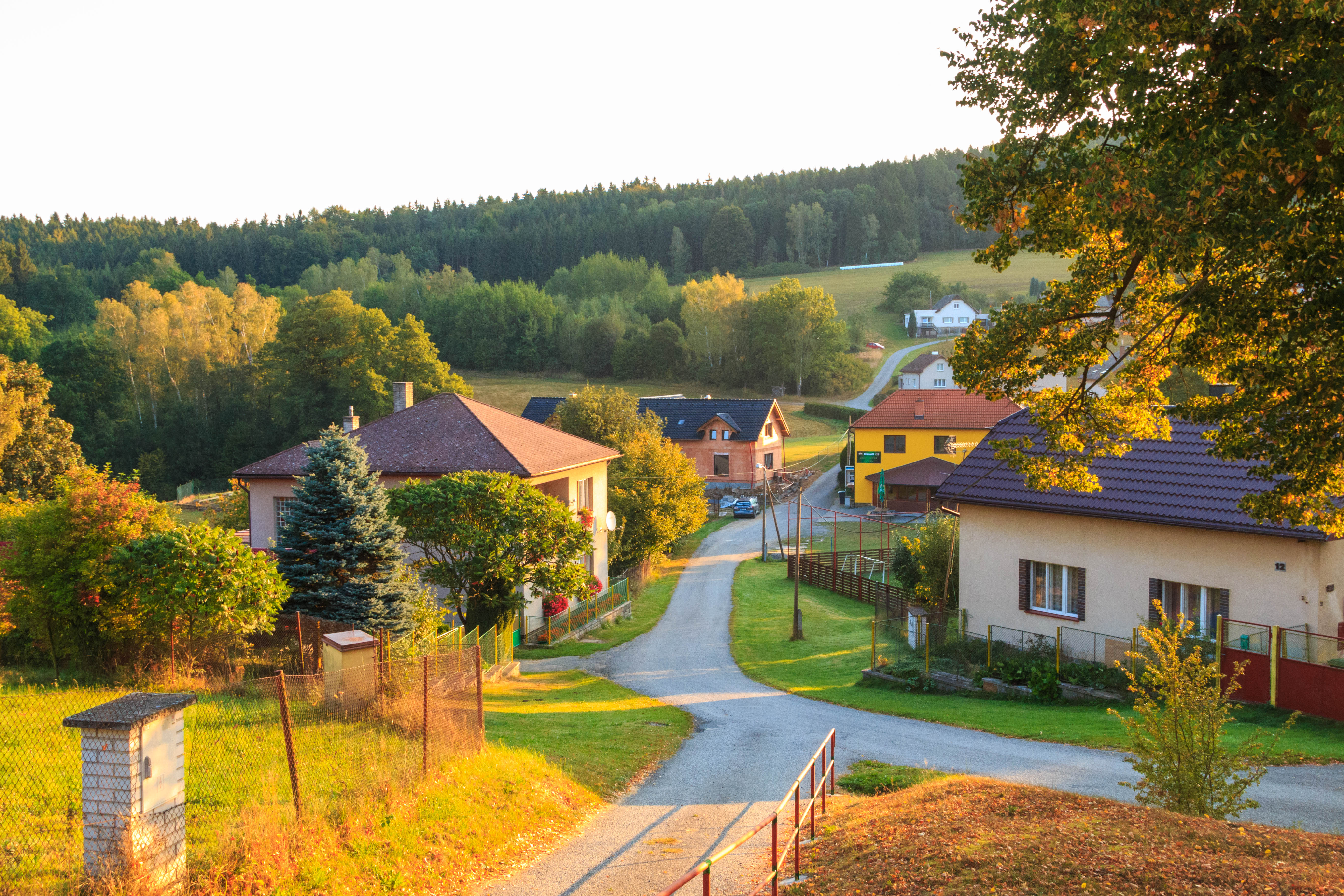 Služátky u Světlé nad Sázavou - čp. 12